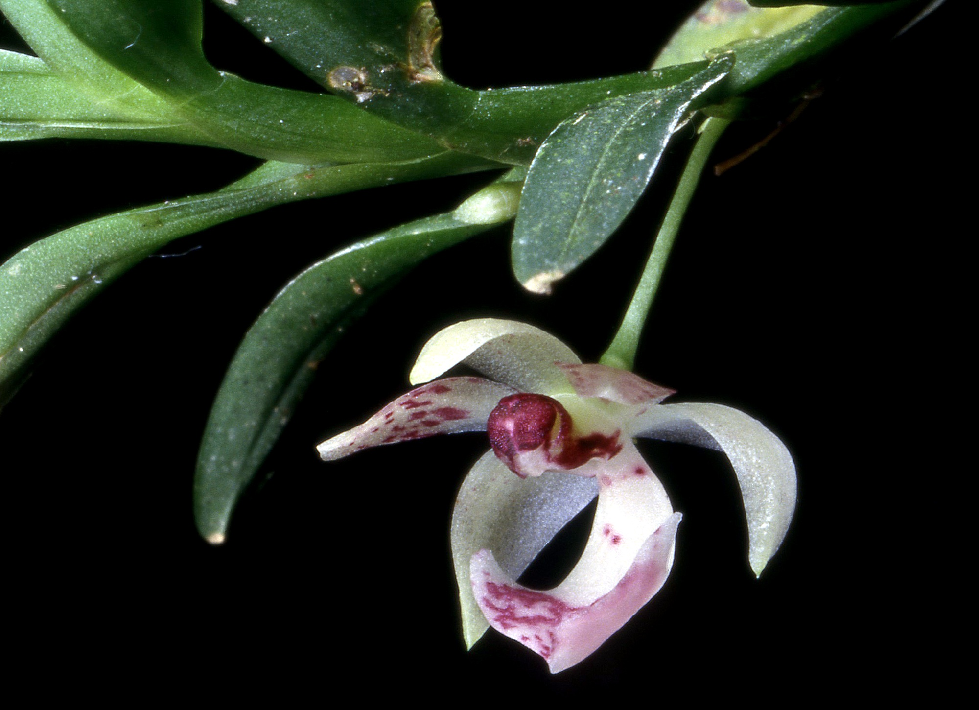 Dichaea ancoraelabia